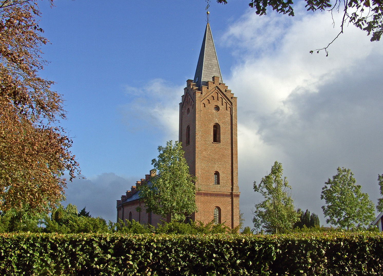 Over Hadsten kirke, Favrskov, fra nordvest